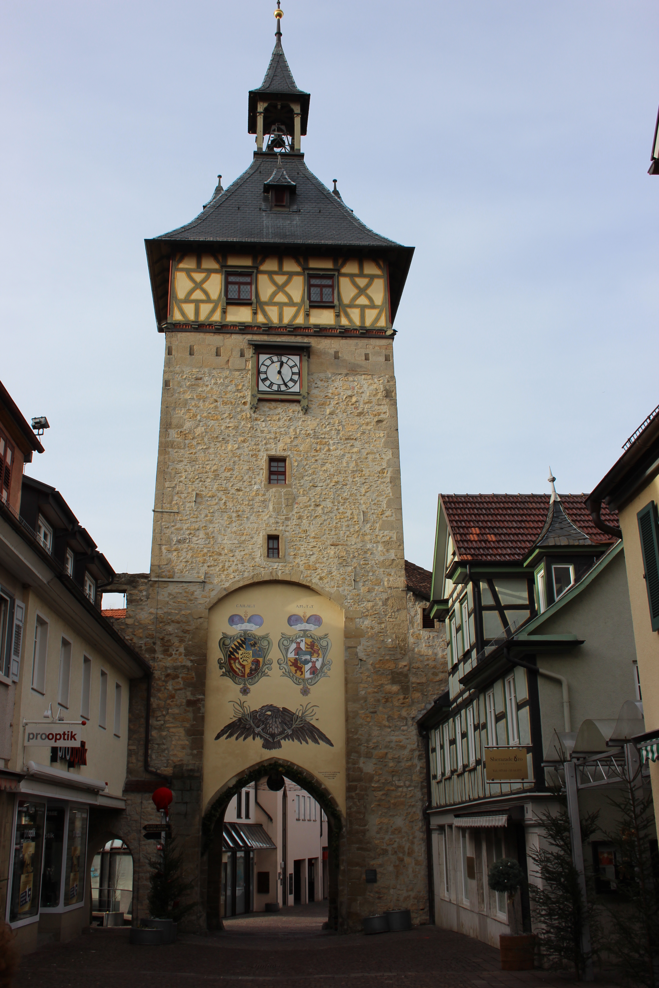 Stadttor in Marbach am Neckar